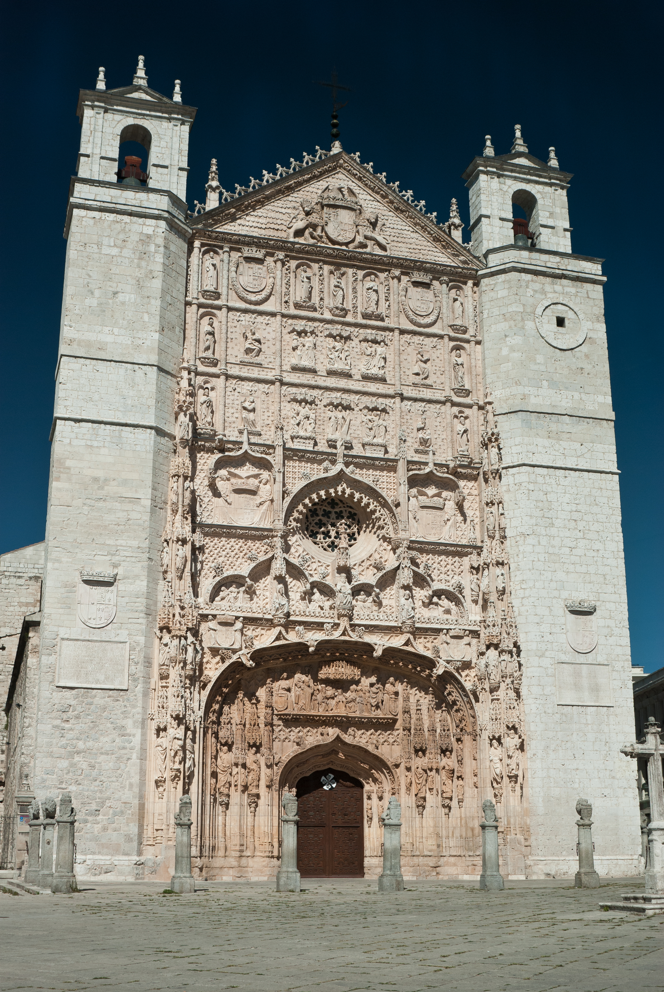 Fachada de la Iglesia conventual de San Pablo de Valladolid